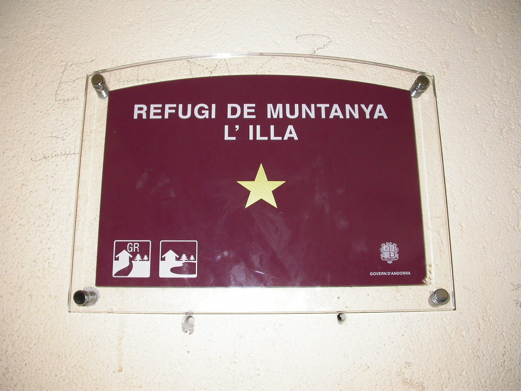 Refuges Andorre Refugi de l'Illa